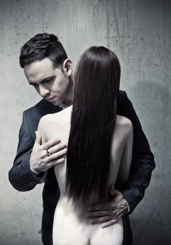 Michael Foret